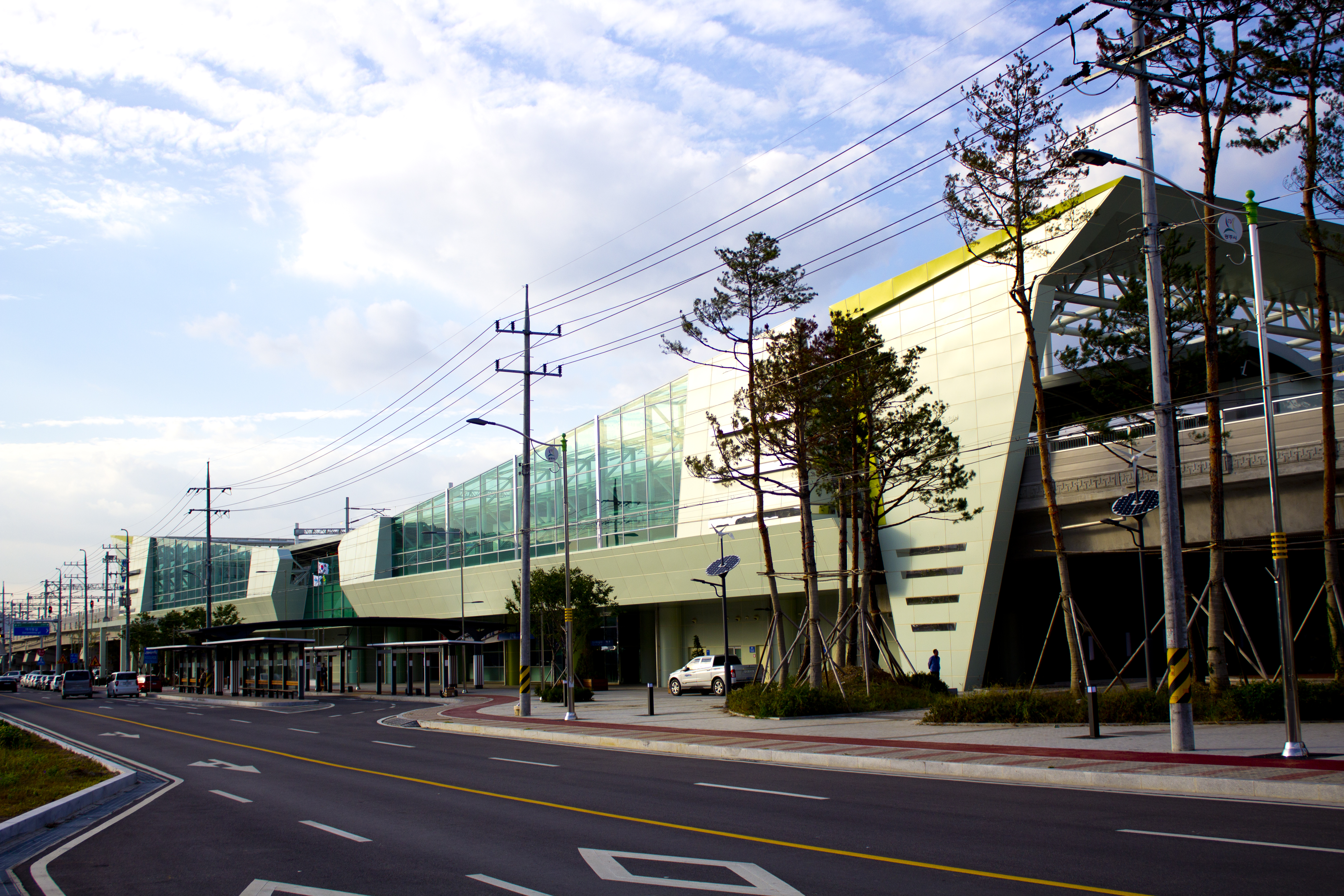 경강선 곤지암 역사 전경